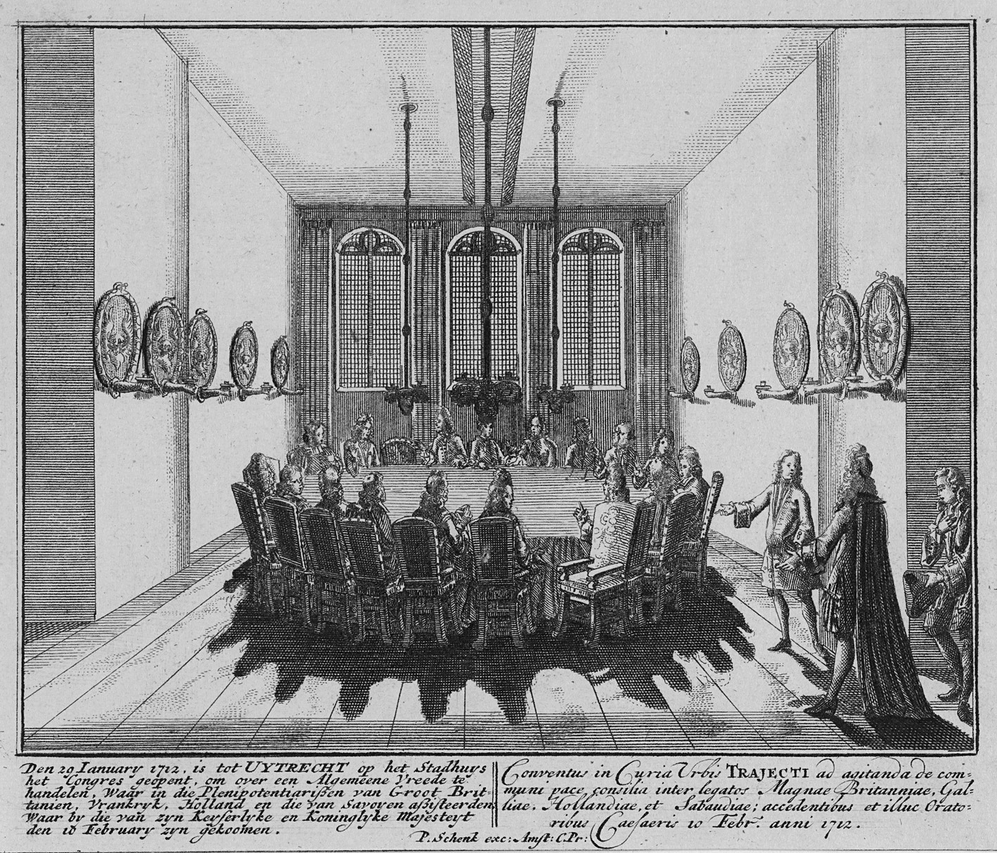 Le 29 janvier 1712 s'ouvre le congrès d'Utrecht qui aboutira aux traités éponymes.